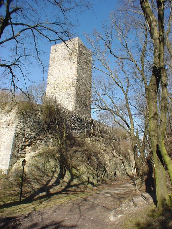 Eckardsburg - Unterburg mit Hungerturm